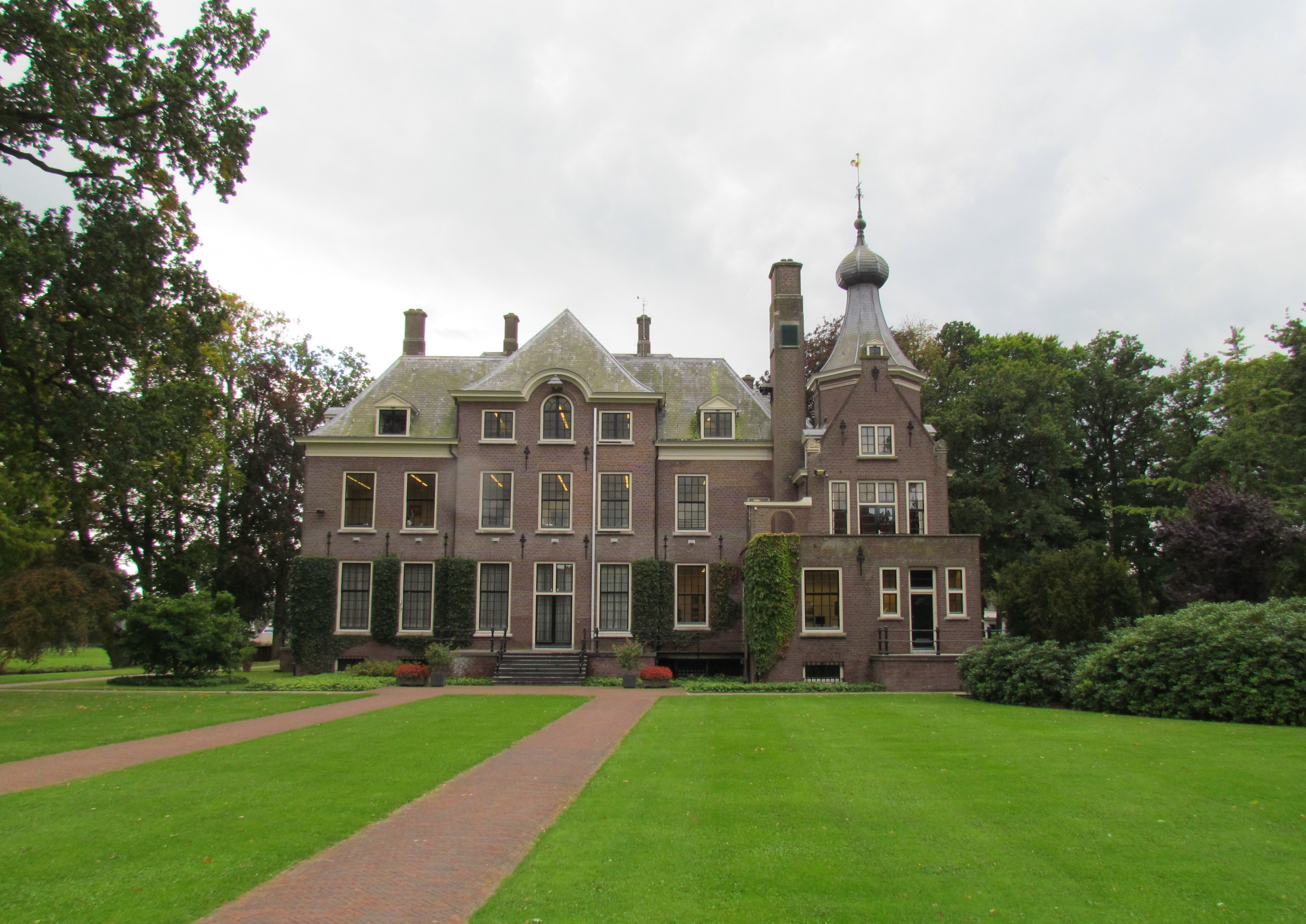 Huis Hoevelaken te Hoevelaken (NL)